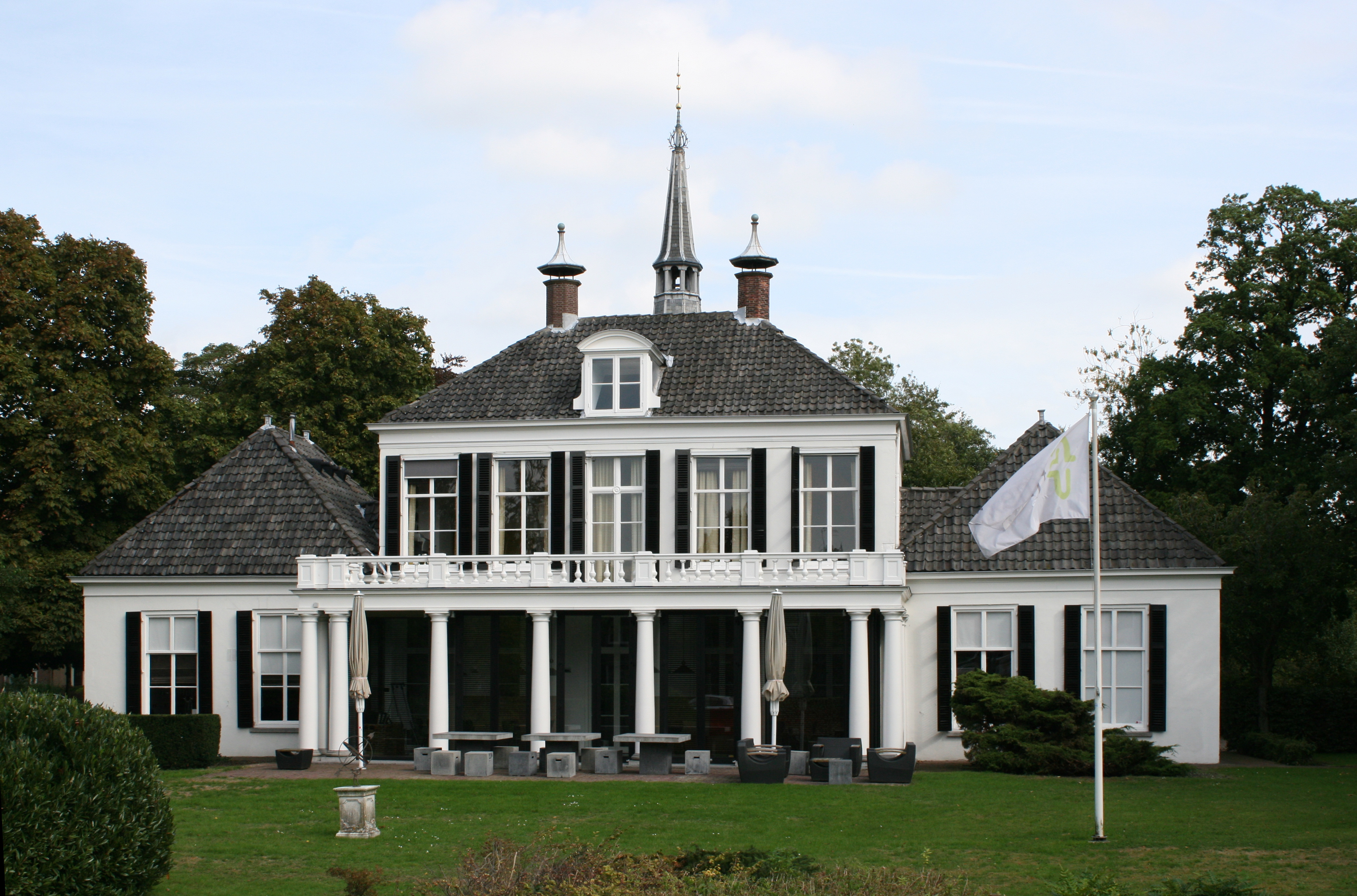 Voorburg, Huis te Werve, Rijksmonument 37966